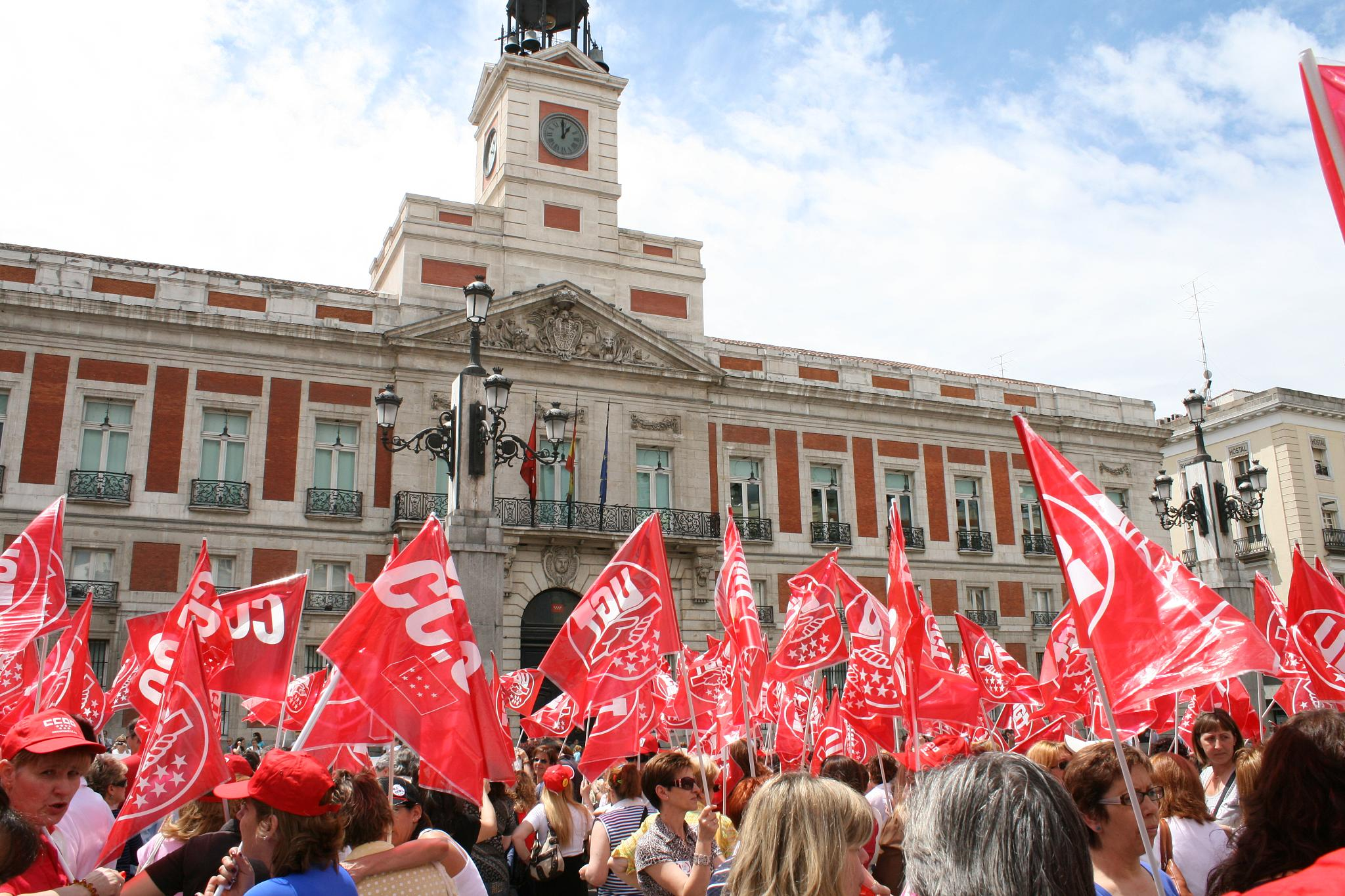 Manifestación de UGT y Comisiones Obreras en la Puerta del Sol, Madrid. 2008